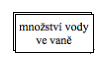 Prvek hladiny SFD v nástroji Vensim